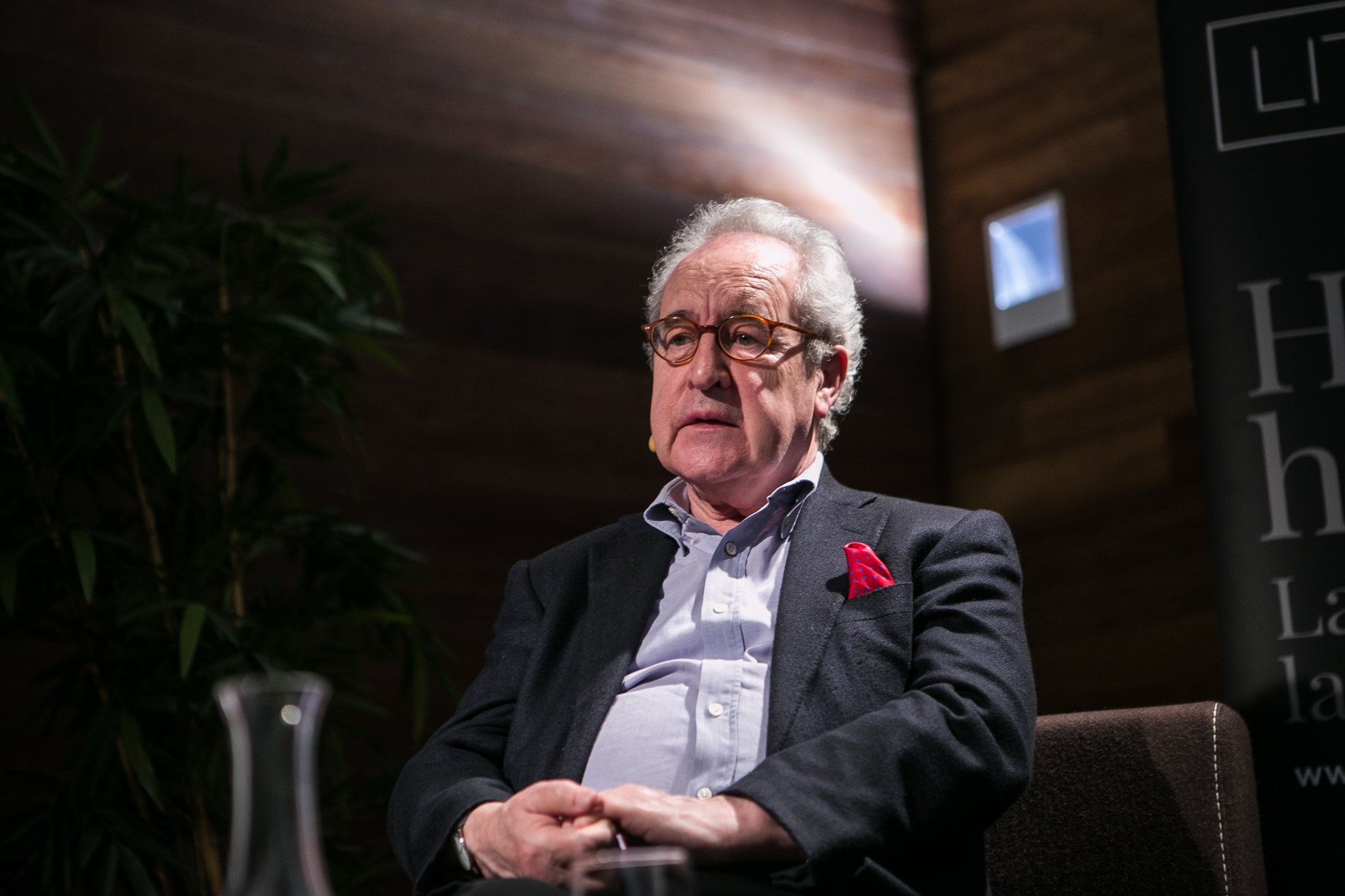 Literaktum 17 San Telmo Museoa Argazkilaria/fotógrafa: Lorena Otero